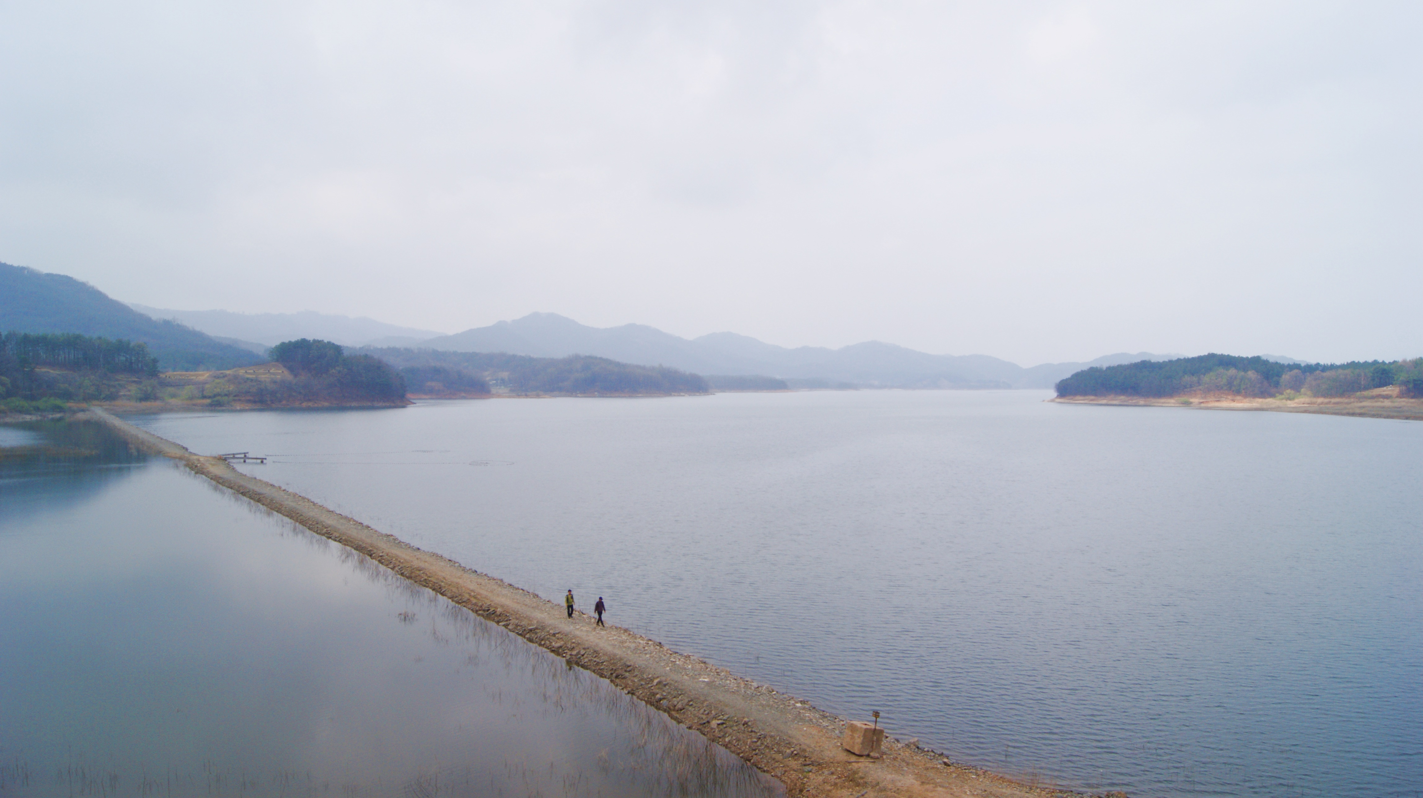 대청호오백리길 4구간_3